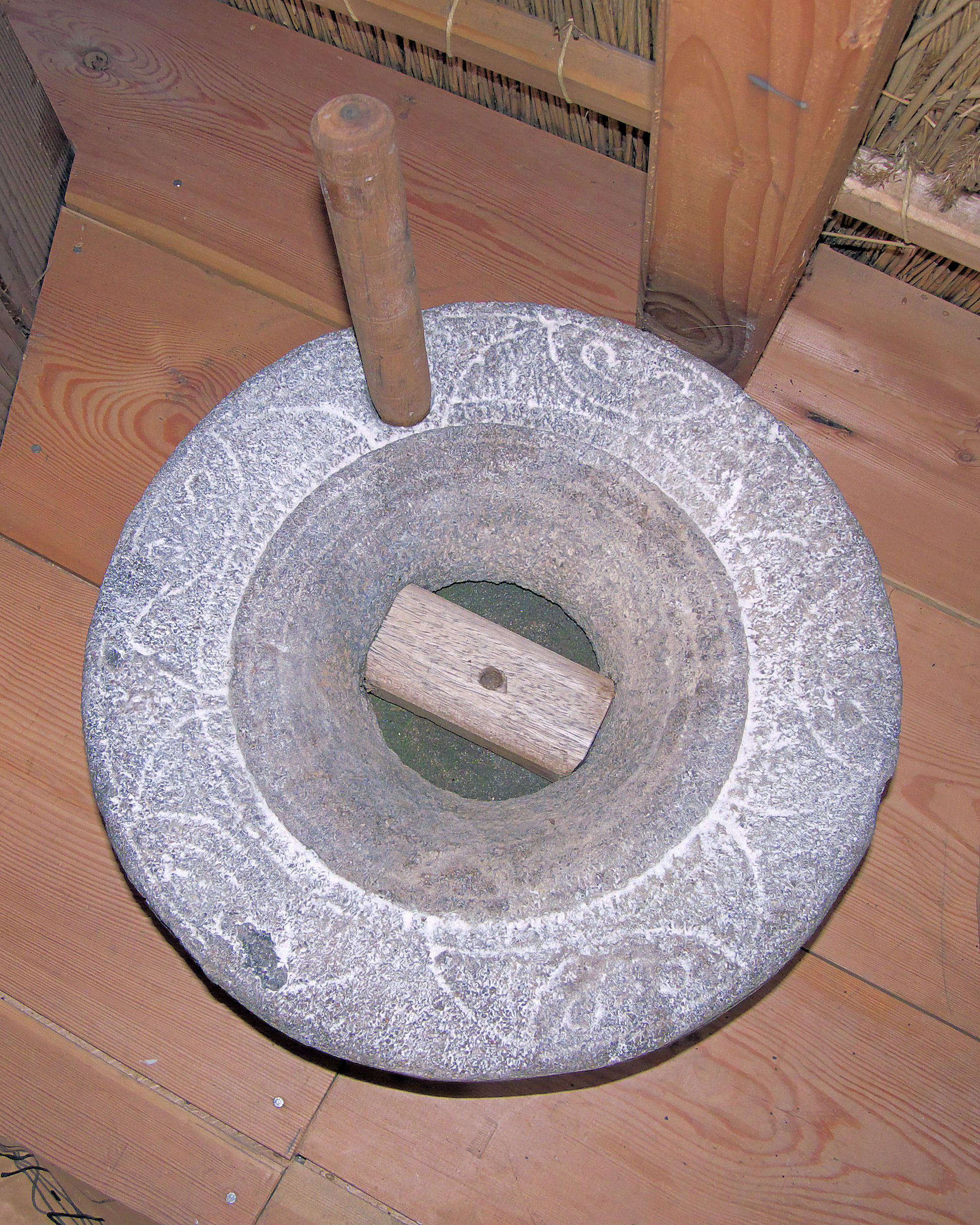 Molen De Hoop, Bunschoten, kweern handmolen